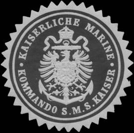 Sealing stamp Title: K. Marine Kommando S.M.S. Kaiser Description: schwarz, weiß, geprägt Place: size: 4 cm